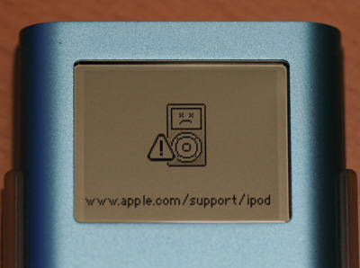 Holo :v